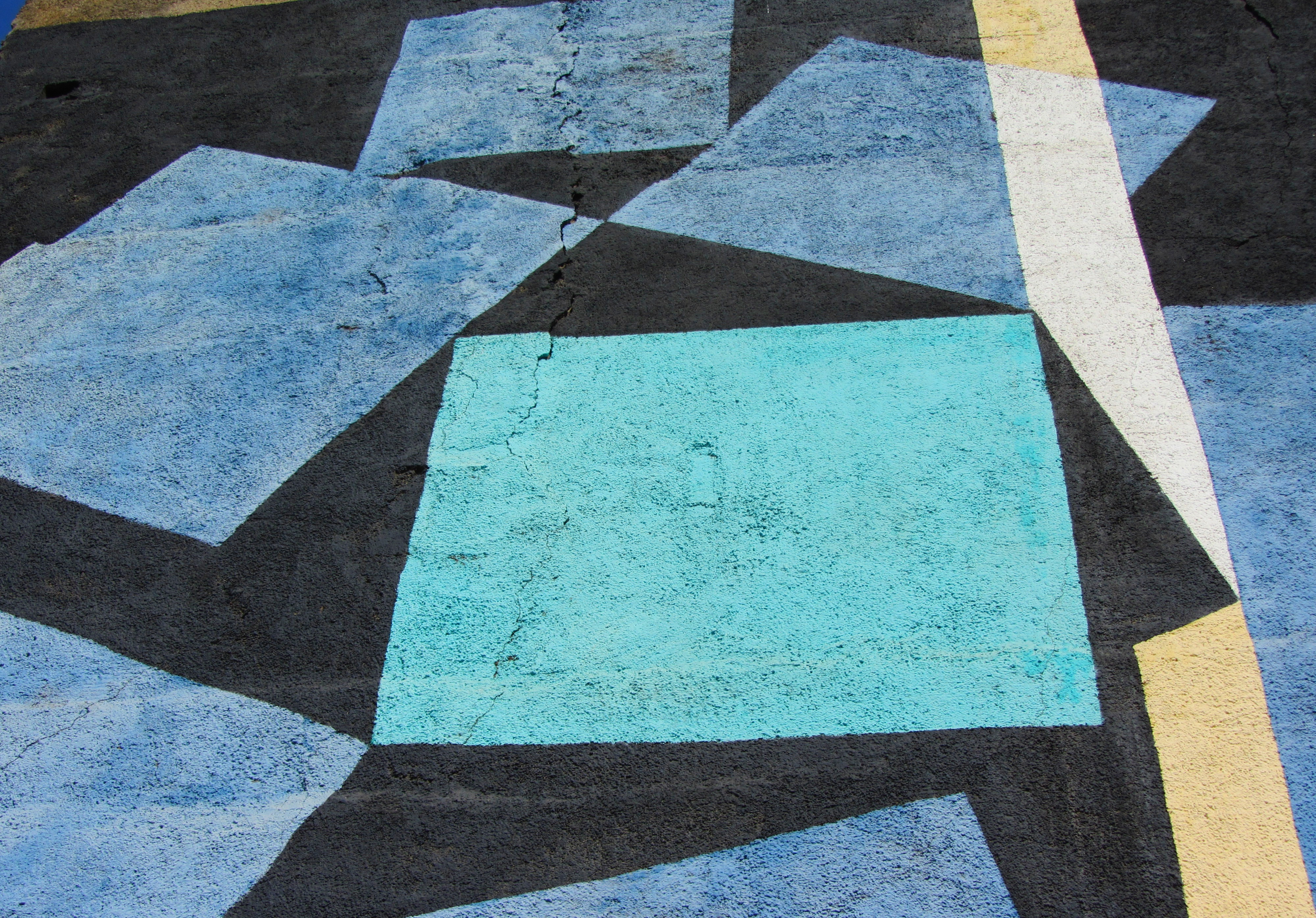 Detalle de La cascada de los cubos azules, de Mario Carreño; mural n.º1 del Museo a Cielo Abrierto, Cerro Bellavista de Valparaíso